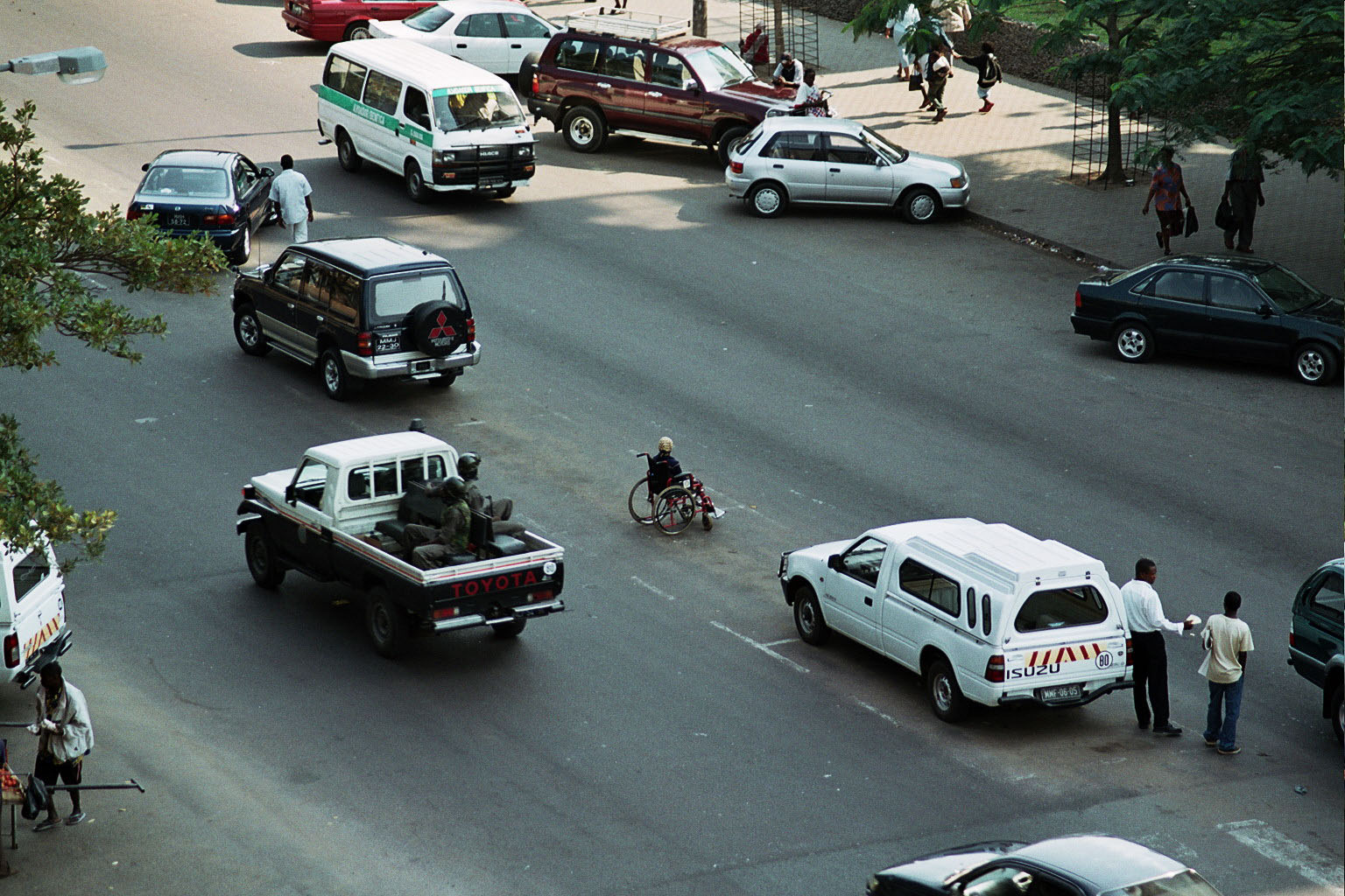 Calle en Maputo (Mozambique)